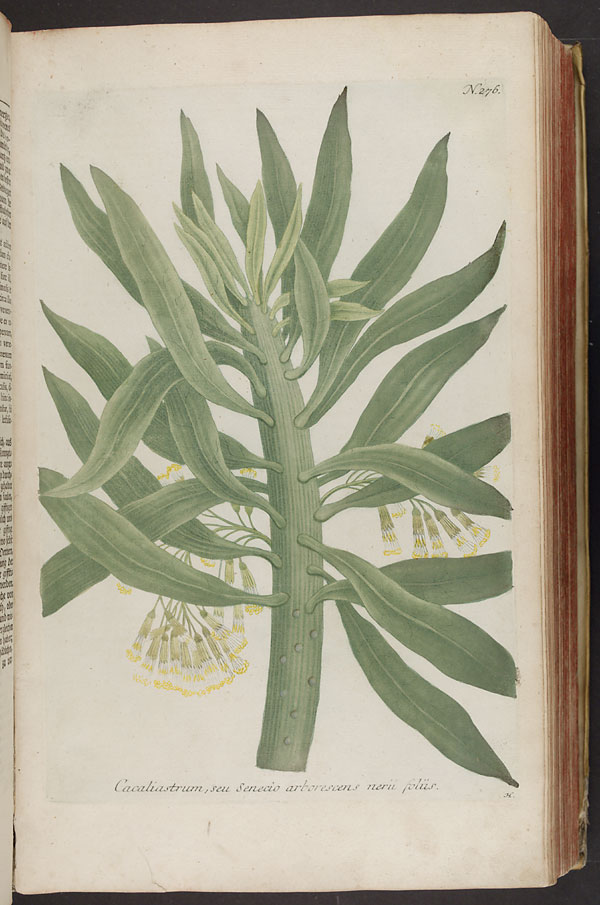 Senecio arborescens from Phytanthoza iconographia, sive, Conspectus aliquot millium : tam indigenarum quam exoticarum, ex quatuor mundi partibus longâ annorum serie indefesoque studio